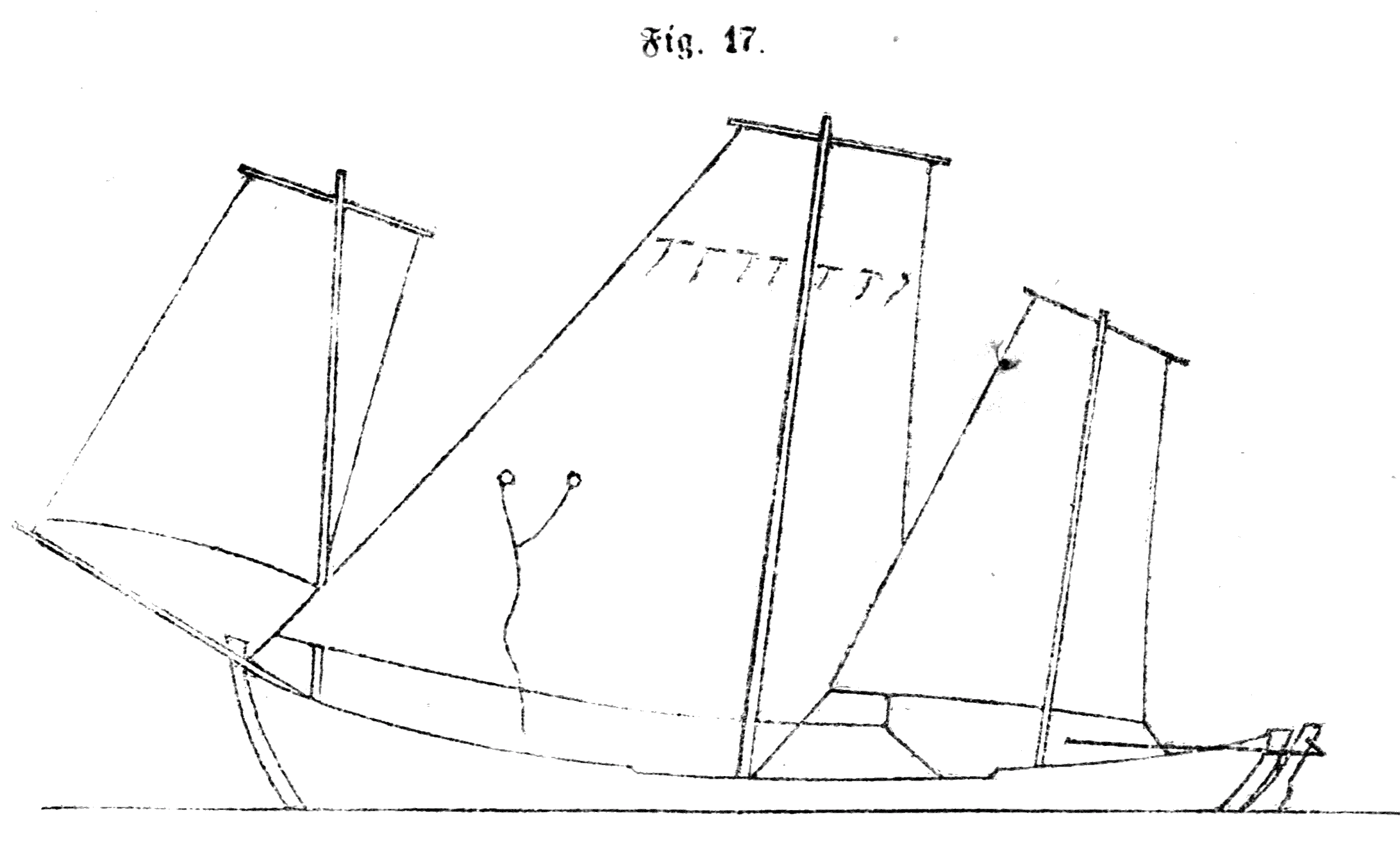 Søndmøers Ottring.